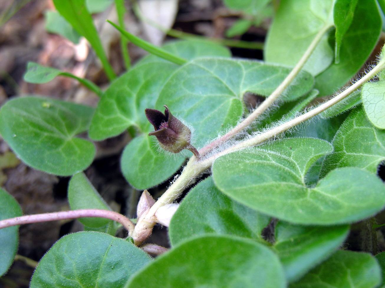 Europinė pipirlapė (Asarum europaeum) Šeima. Kartuoliniai (Aristolochiaceae) Fotografavo: User:Algirdas, 2006 m. gegužės 13 d., Lietuva.